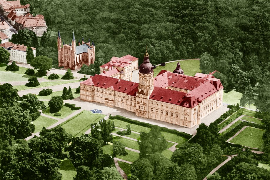 Schloss Neustrelitz Luftbild koloriert